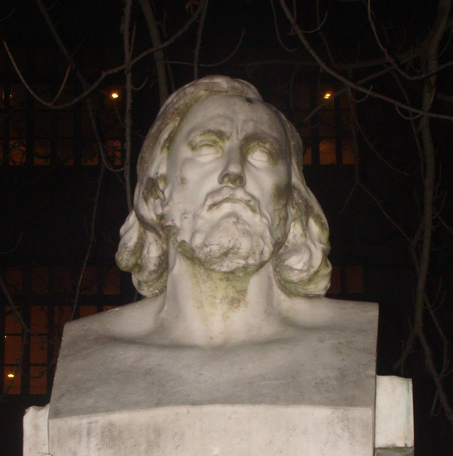 Buste de Pierre Dupont, dans le jardin des Chartreux, à Lyon (1er). Au dos est gravé : « A Pierre Dupont 1821 - 1870 Sa ville Ses amis Erigé en 1899 »